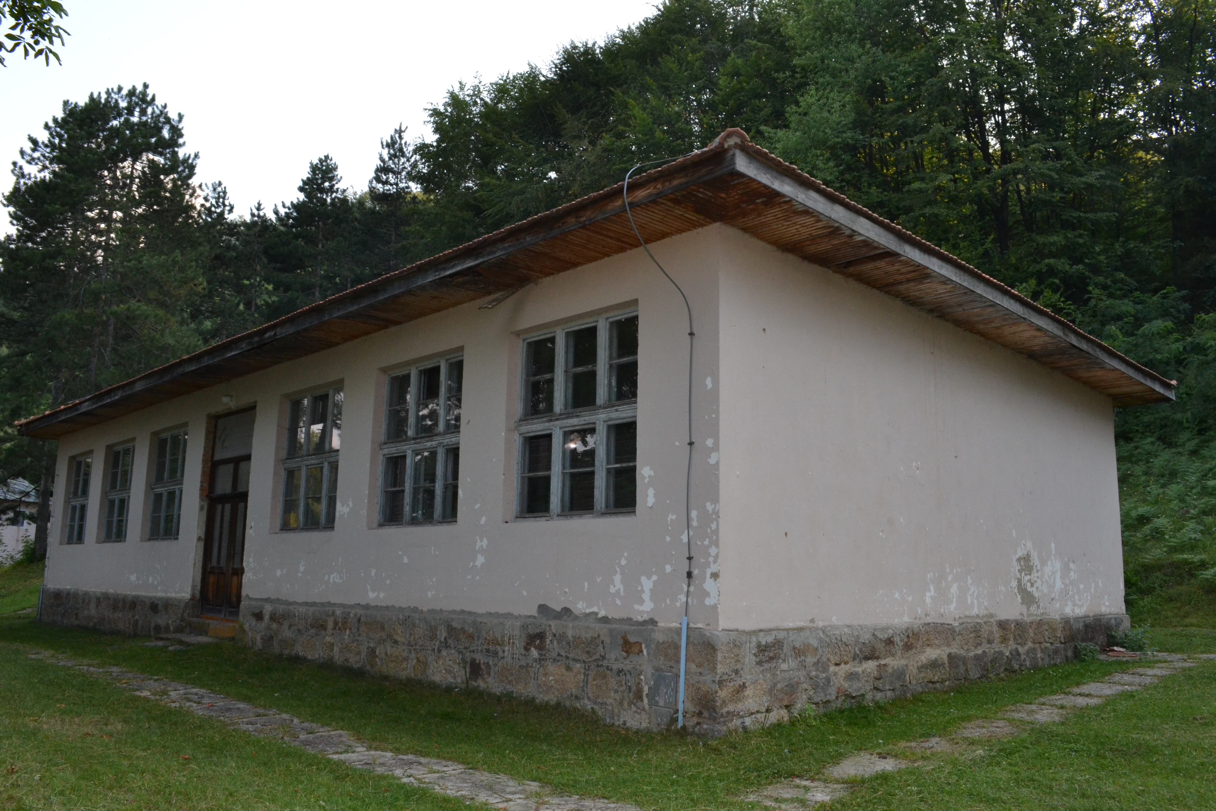 Škola u Crvenoj Gori